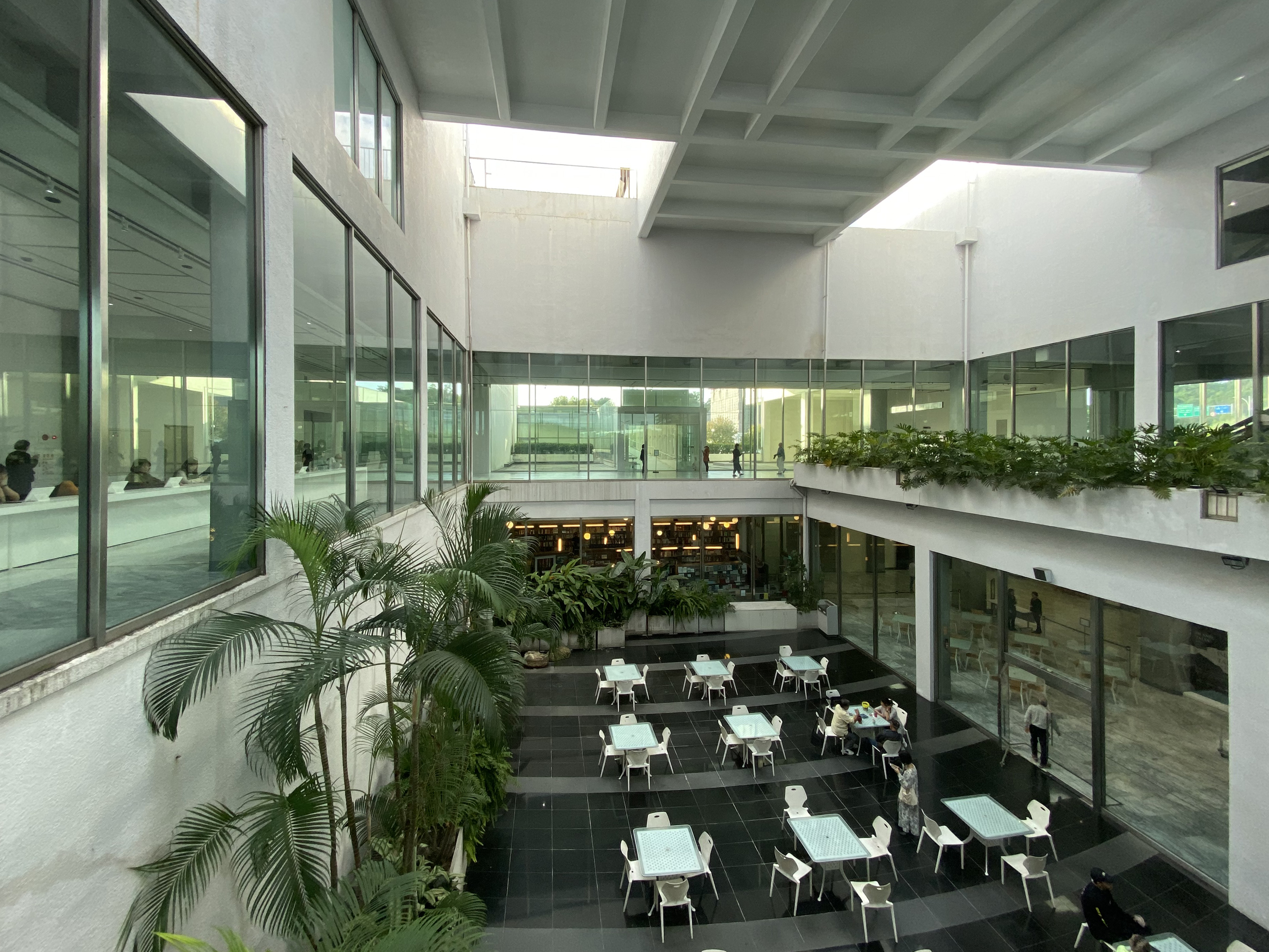 Taipei Fine Arts Museum Courtyard